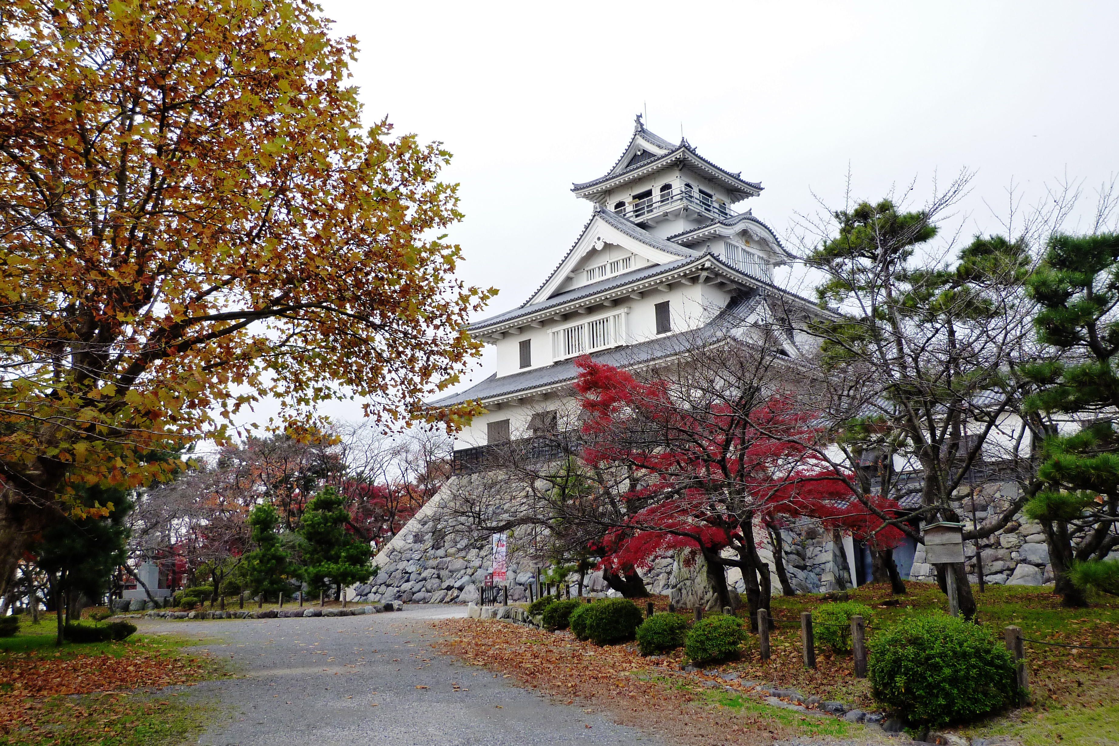 Nagahama Castle(長浜城), Nagahama, Shiga prefecture, Japan